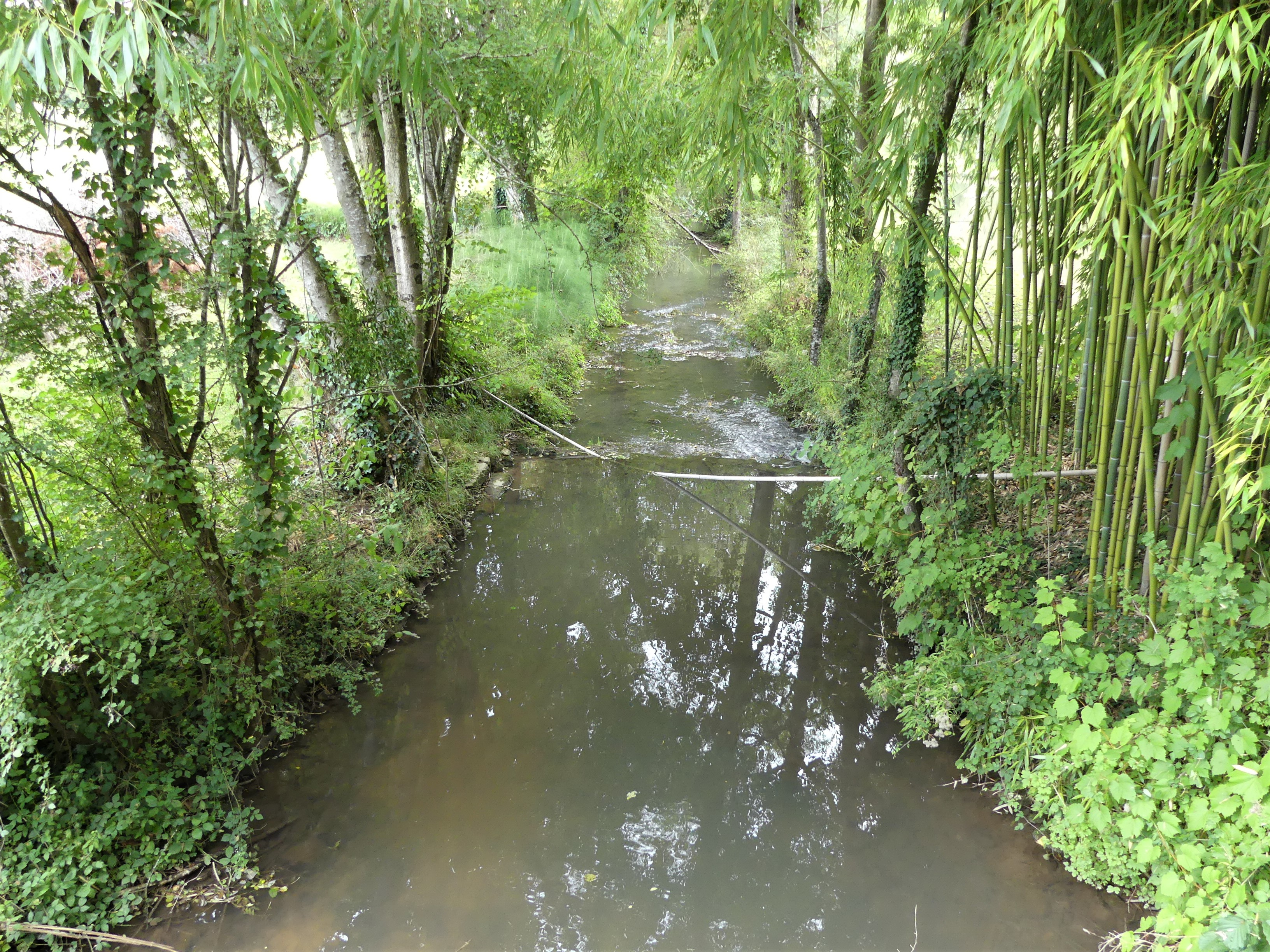 La Nizonne au pont de la route départementale 99, en limite de la commune de Sainte-Croix-de-Mareuil (à gauche) et de la commune déléguée des Graulges (à droite, commune nouvelle de Mareuil en Périgord), Dordogne, France. Vue prise en direction de l'aval.